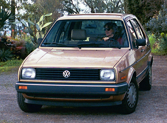 1986 US model Volkswagen Golf.